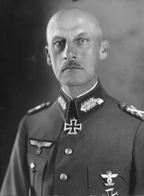 Wilhelm Ritter von Leeb Generalfeldmarschall Ritter v. Leeb (15.8.1940) [Wilhelm von Leeb (Porträt)] Abgebildete Personen: Leeb, Wilhelm von Ritter: Generalfeldmarschall, Ritterkreuz (RK), Heer, 1942 entlassen, Deutschland (GND 118570870)